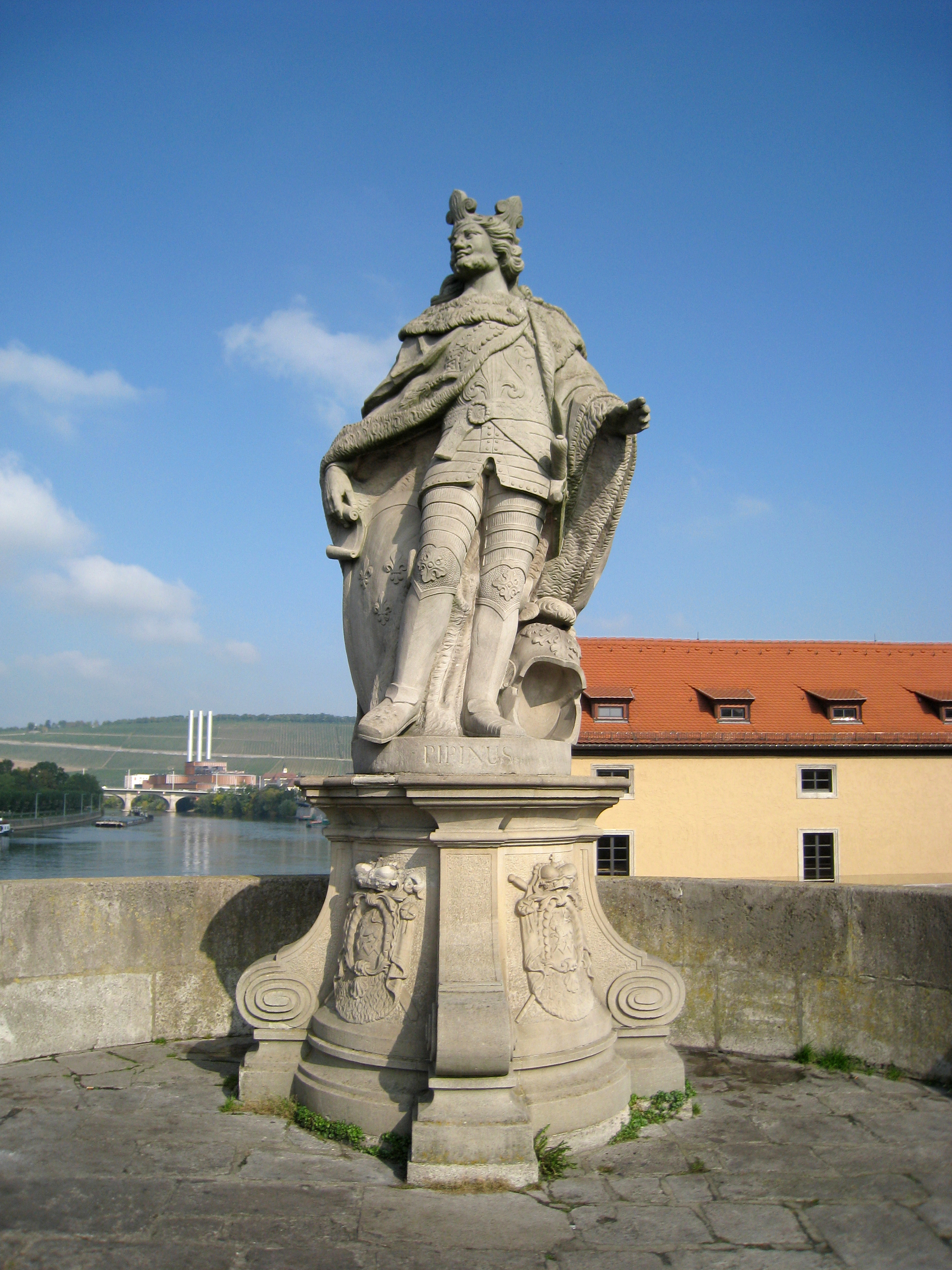 Steinfigur auf der Nordseite der Alten Mainbrücke in Würzburg: Pipinus